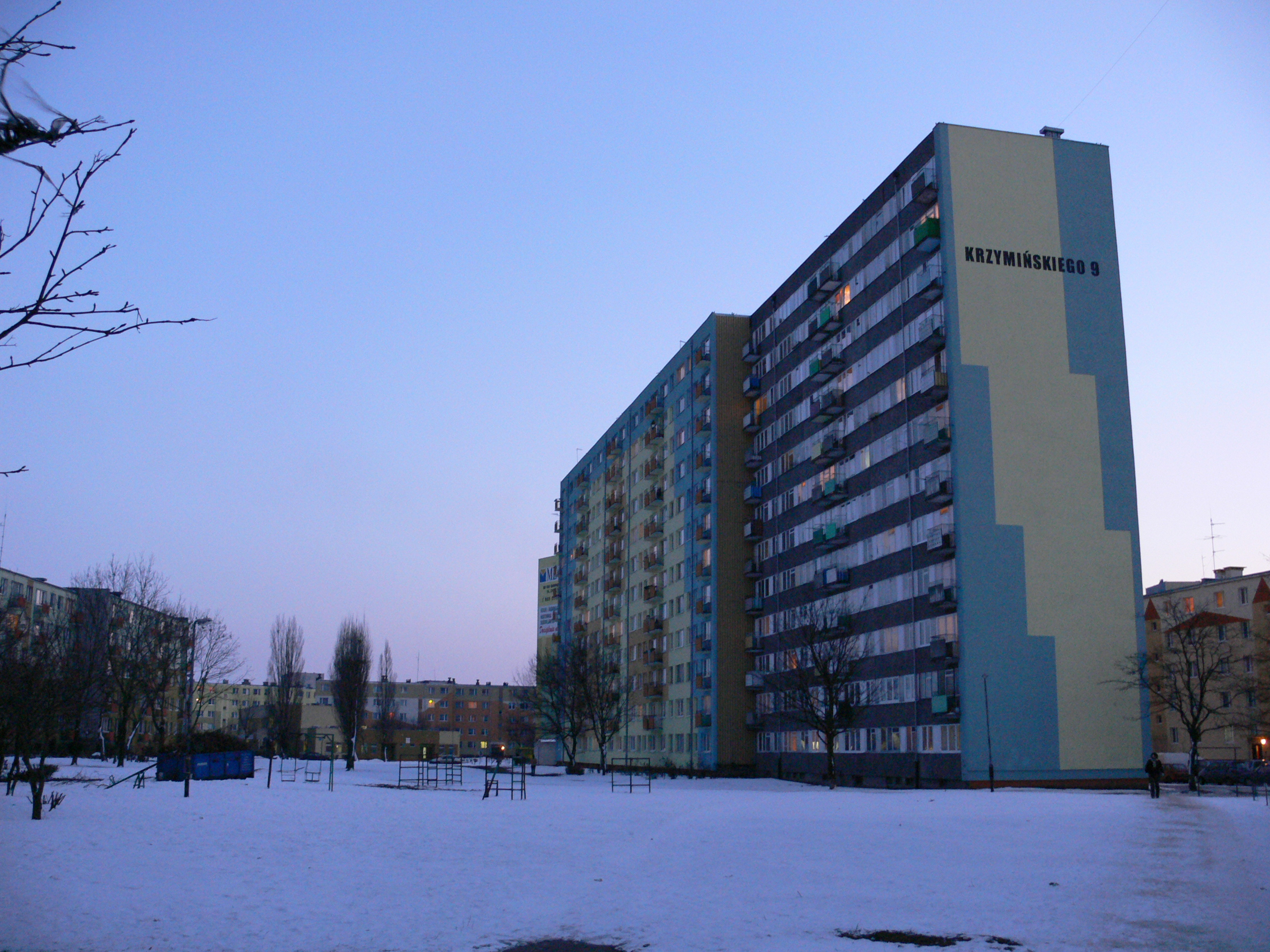 Inowrocław - Osiedle Rąbin - ul.Krzymińskiego.